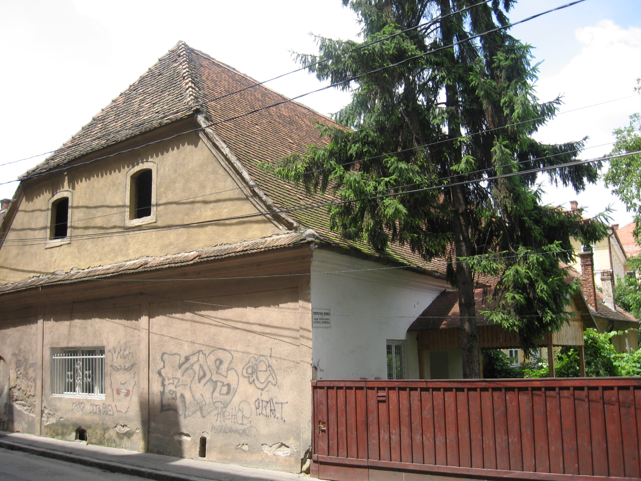 Cluj-Napoca, vechea parohie reformată-calvină de pe strada M.Kogălniceanu